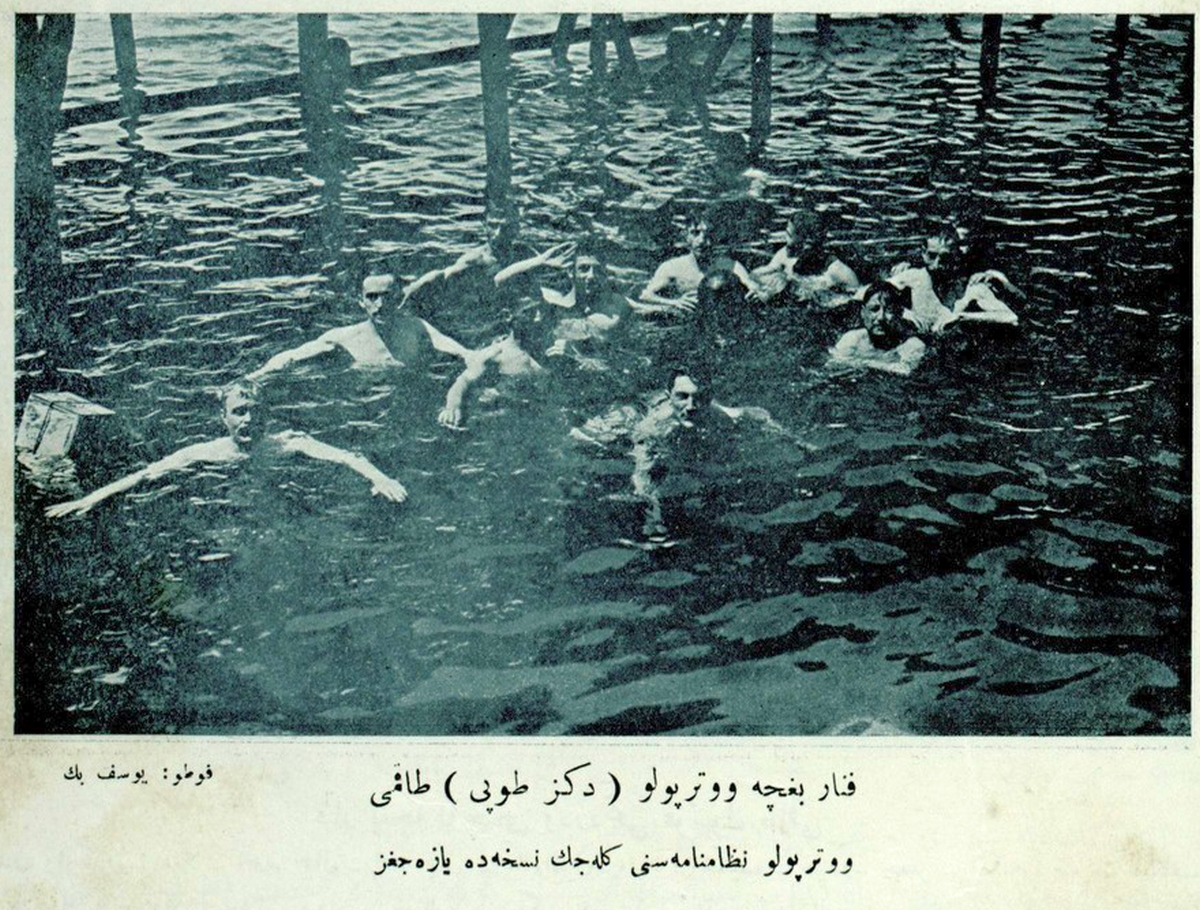 Meşhur Fenerbahçelilerden Elkatipzade Mustafa Bey'in ve Galip Bey'in (Kulaksızoğlu) de göründüğü, 15 Haziran 1913 tarihli İdman mecmuasında yer alan fotoğrafın altında şöyle yazıyor : "Fenerbahçe waterpolo (deniz topu) takımı. Waterpolo nizamnamesini gelecek nüshada yazacağız"